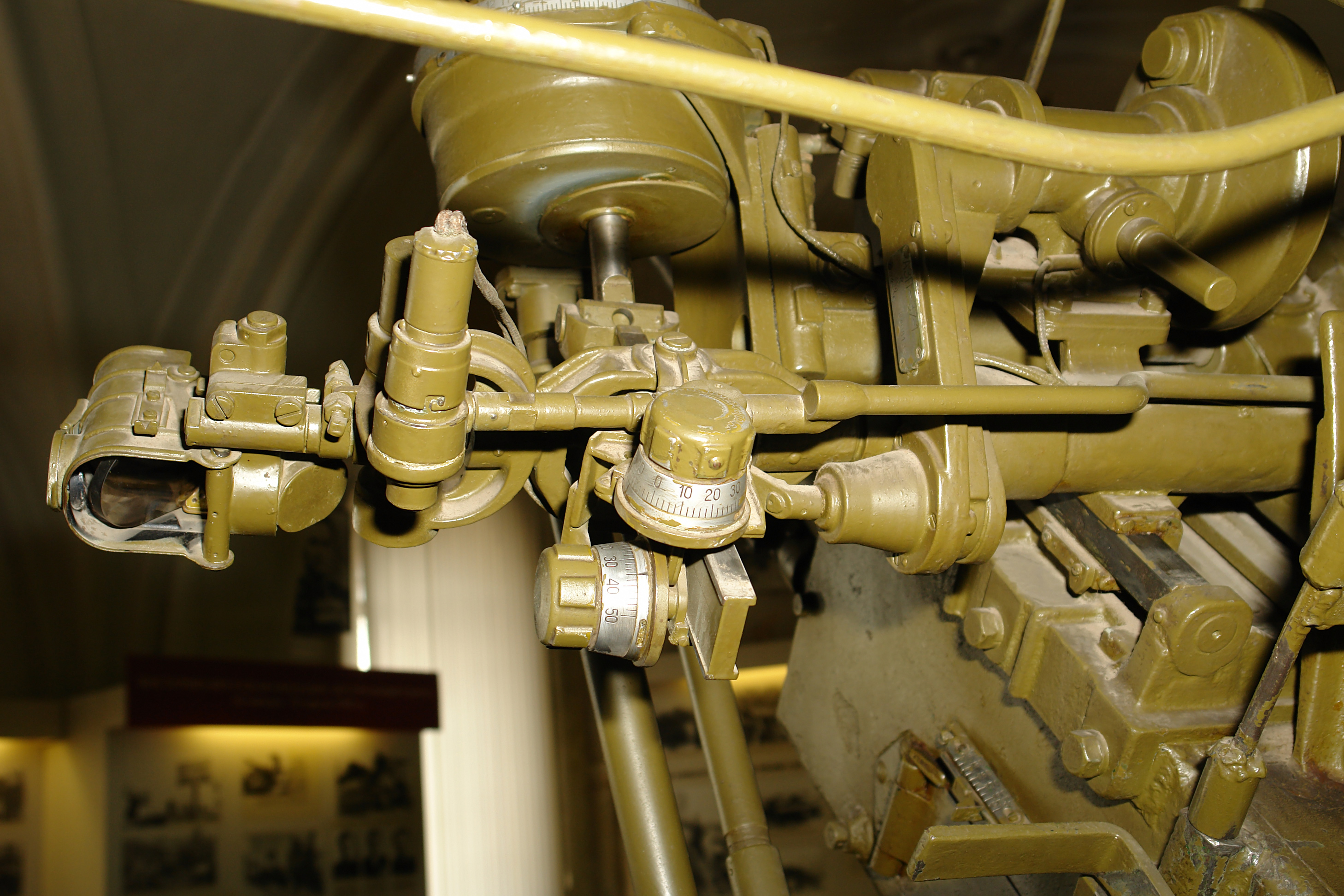 37-мм АВТОМАТИЧЕСКАЯ ЗЕНИТНАЯ ПУШКА обр. 1939 г. № 78381. Командир орудия—гвардии старший сержант Н. В. АНДРЮШОК. Орудийный расчет под командованием гвардии старшего сержанта Н. В. Андрюшка в составе гвардейской зенитной части в период Висло-Одерской операции прикрывая с воздуха одно из подразделений 4-й танковой армии. В районе Пославице он сбил два самолета и уничтожил несколько десятков гитлеровцев. Это были третий и четвертый самолеты на счету командира орудия. За умелые действия и личный героизм ему было присвоено высокое звание Героя Советского Союза. Военно-исторический музей артиллерии, инженерных войск и войск связи, Санкт-Петербруг.